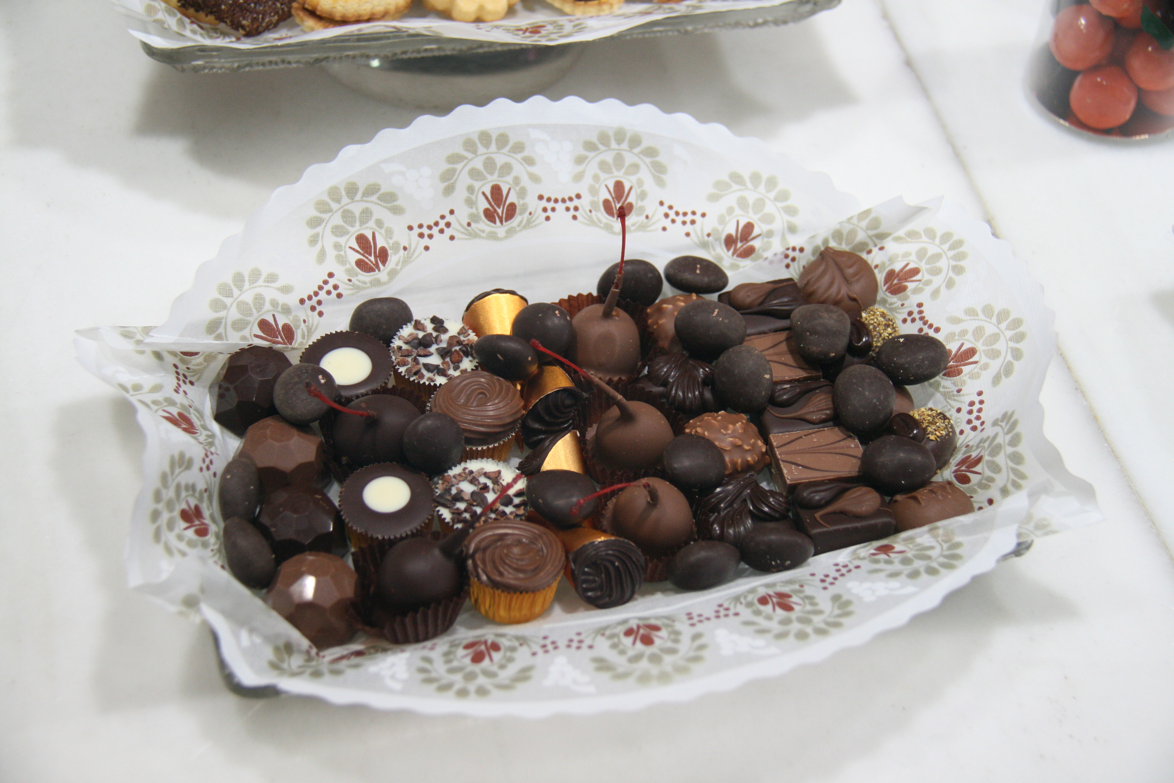 Bandeja de Bombones y frutas recubiertas